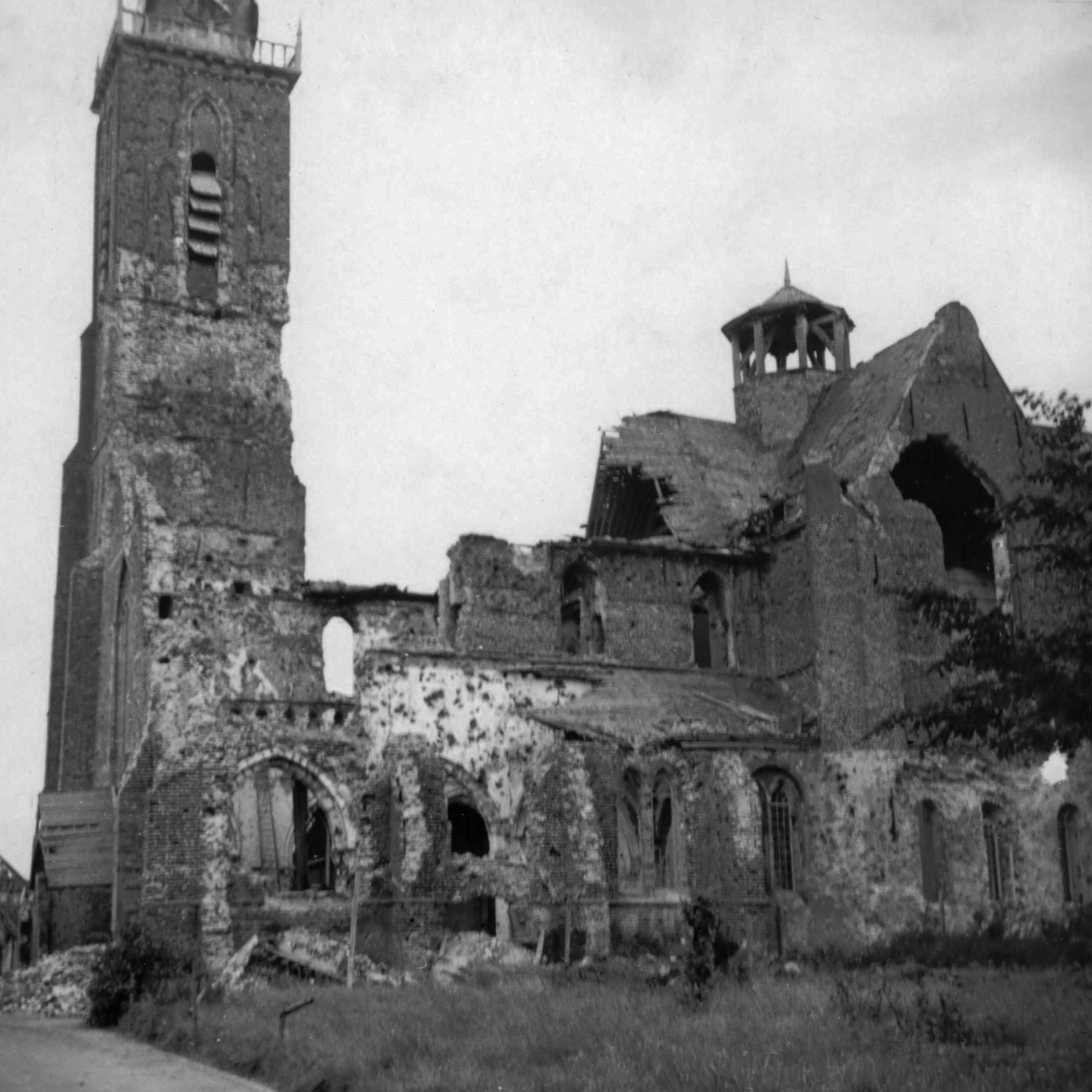 De tijdens oorlogshandelingen verwoeste St. Bavokerk te Aardenburg (Zeeuws-Vlaanderen) 1944